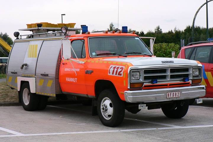 Autopompe Dodge Ram 4x4 transformée en camion de balisage des pompiers d'Hannut, en Belgique.